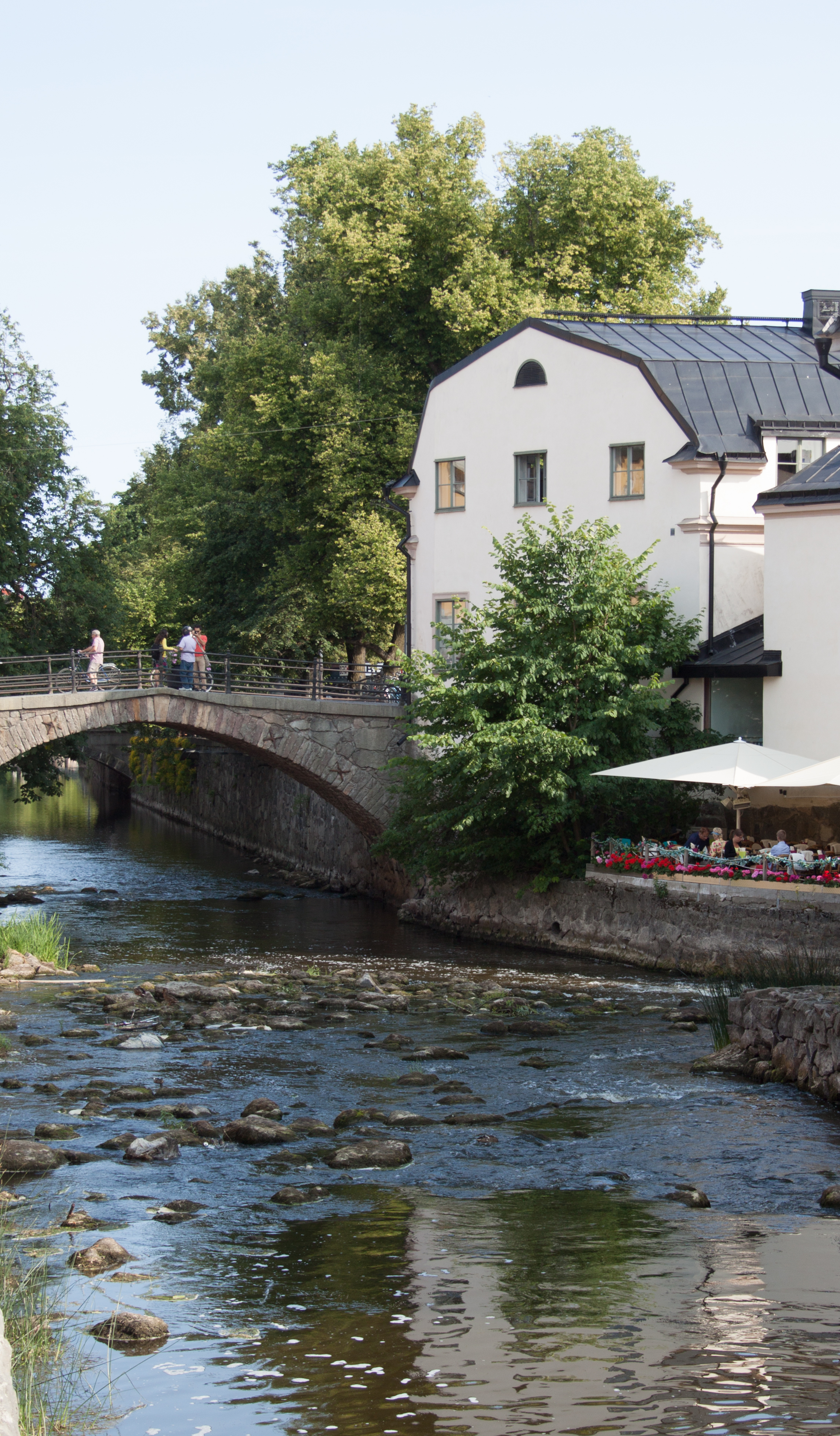 Fyris River in Uppsala